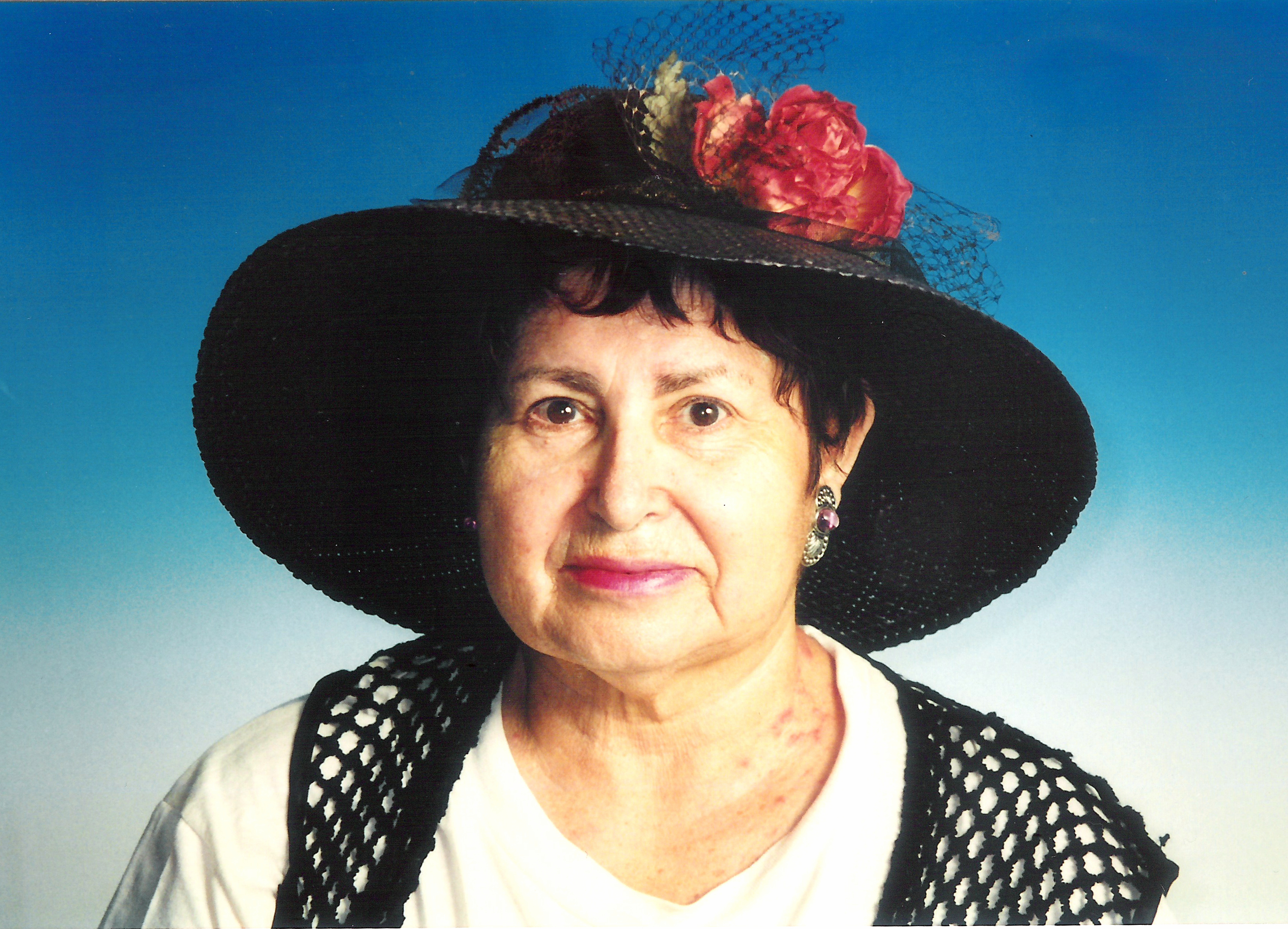 רחל שדה חן